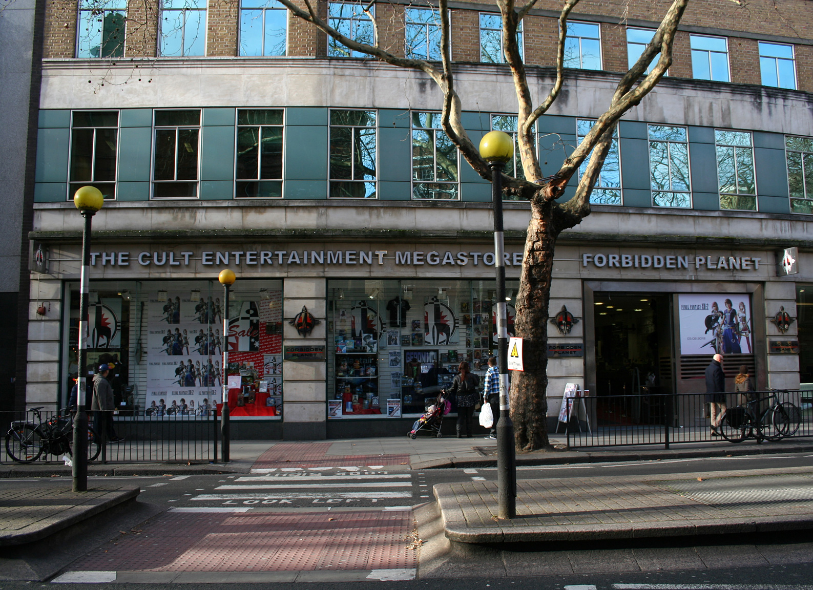 Forbidden Planet store, 179 Shaftesbury Avenue, London